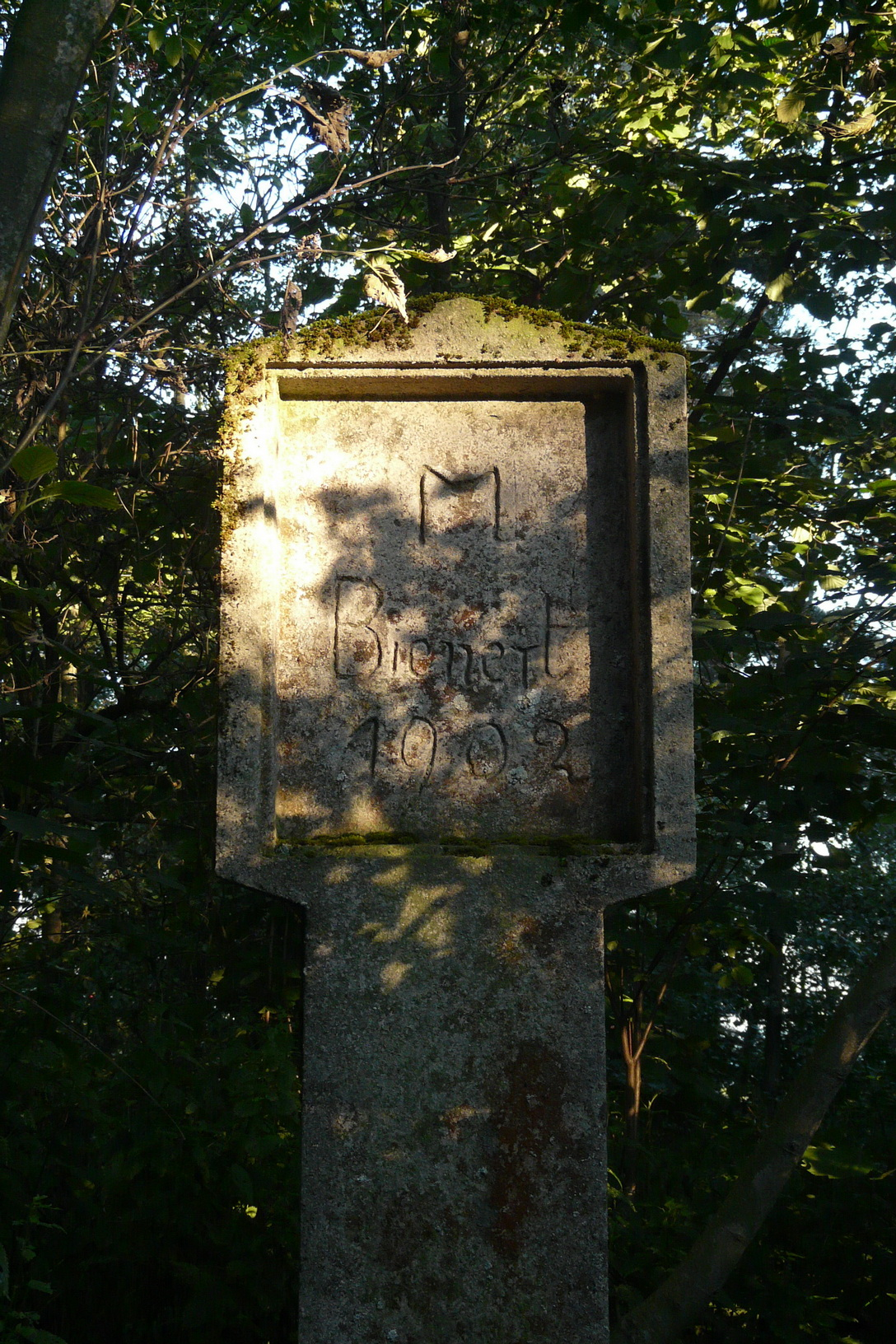 Sloupek křížové cesty na Kotelském vrchu